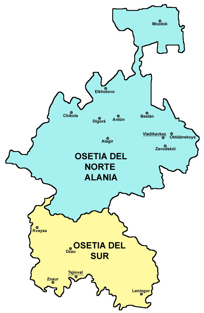 Mapa de Osetia del Norte y Osetia del Sur